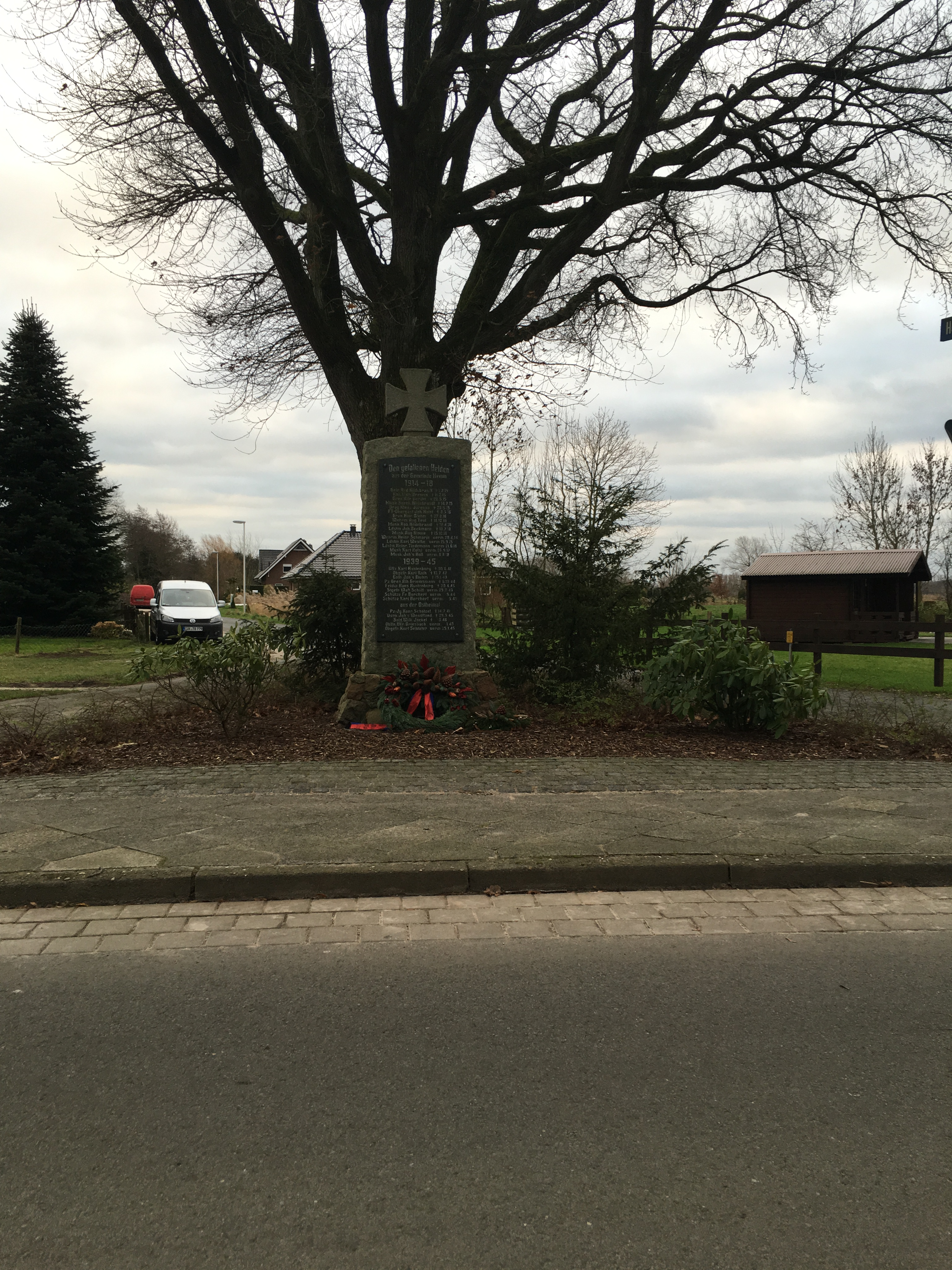 Kriegerdenkmaal in Hemm